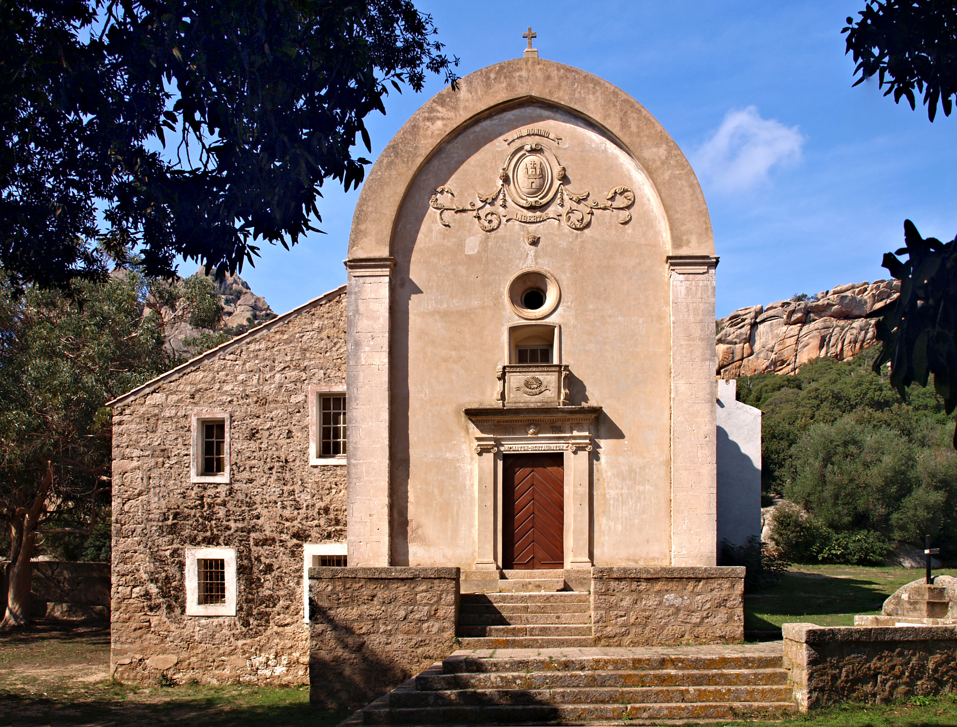 Bonifacio (Corse-du-Sud) - Emitage de la Trinité de Bonifacio (Eglise de la Trinité + oratoire Notre Dame de Tibhirine)